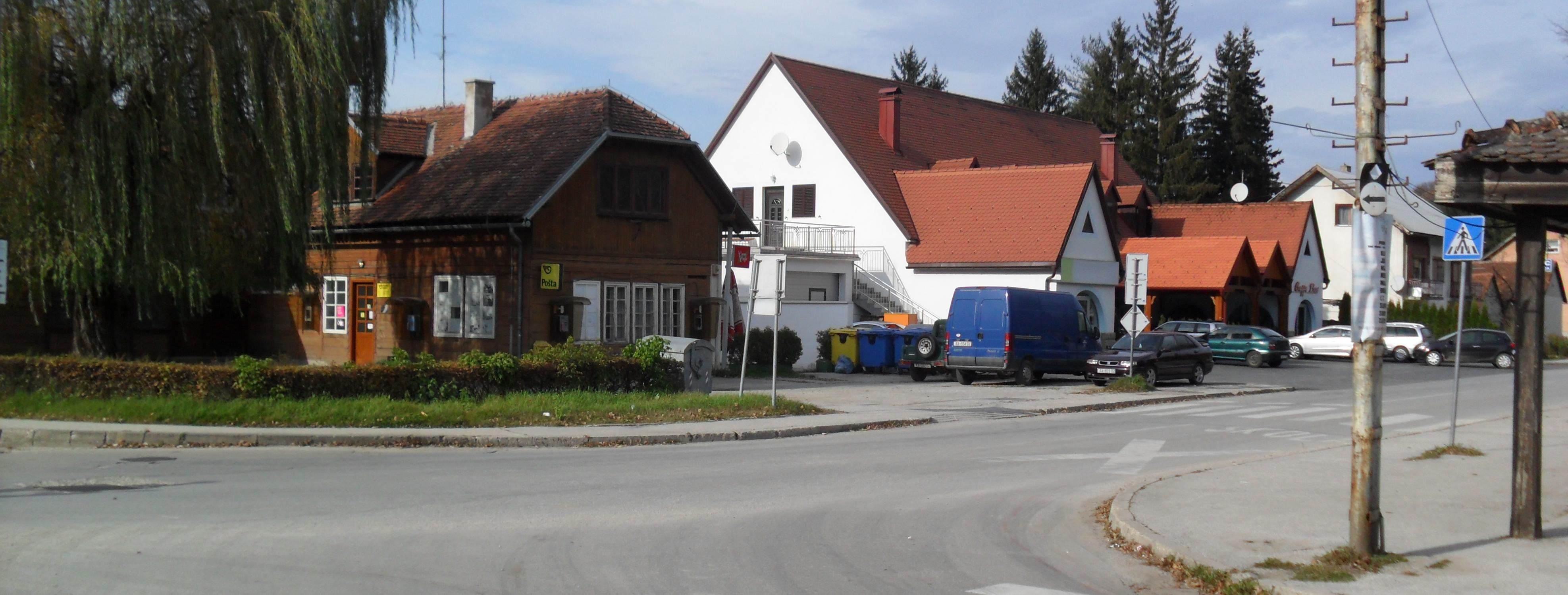 31.10.2010. _ Vojnić